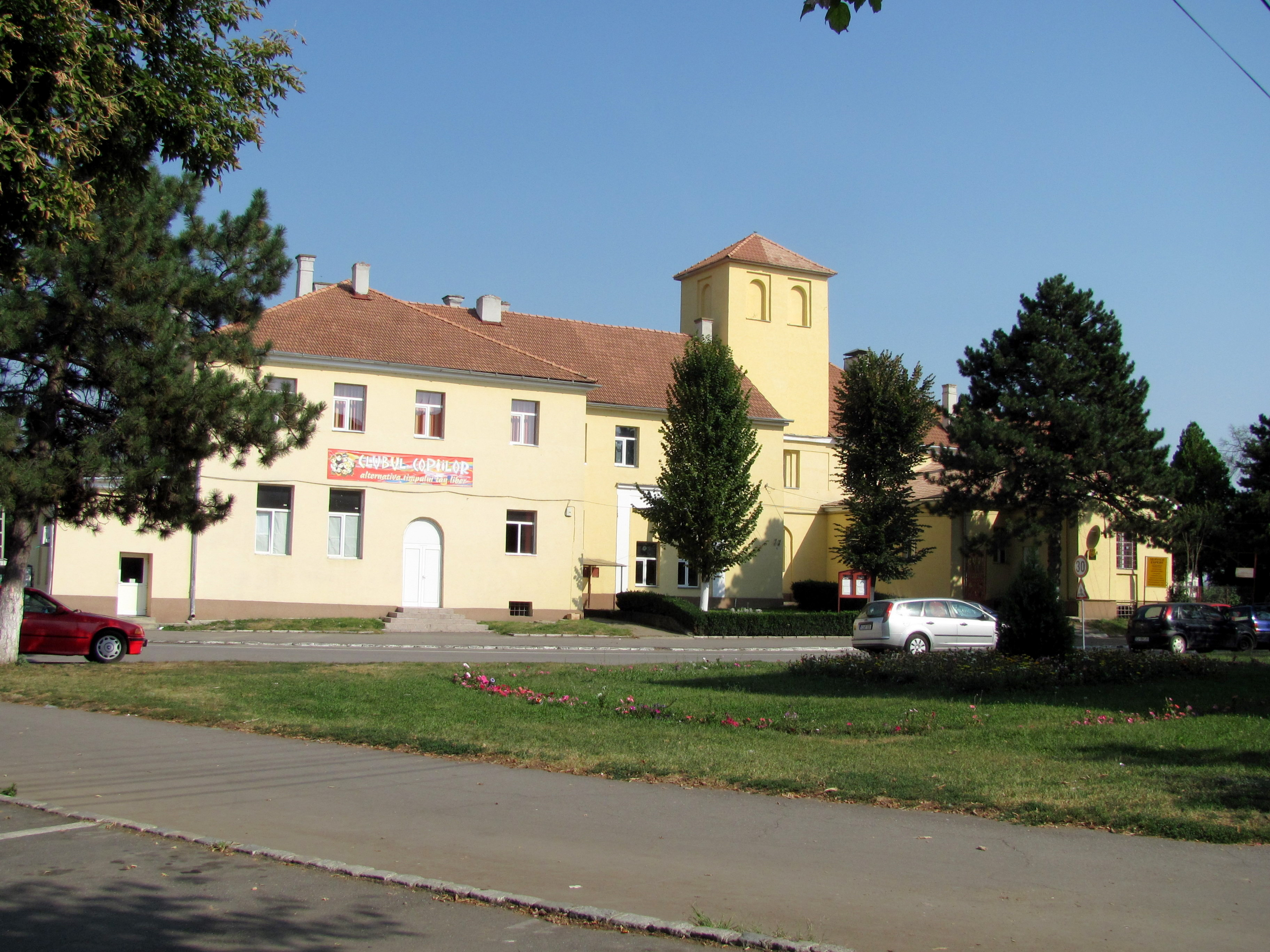 Câmpia Turzii, Str.Parcului nr.10, Clubul copiilor (fostul conac Paget)